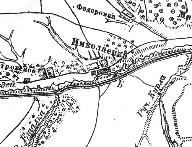 Деревня Николаевка на трёхвёрстной карте Шуберта Симбирской губернии 1870-1919 г..